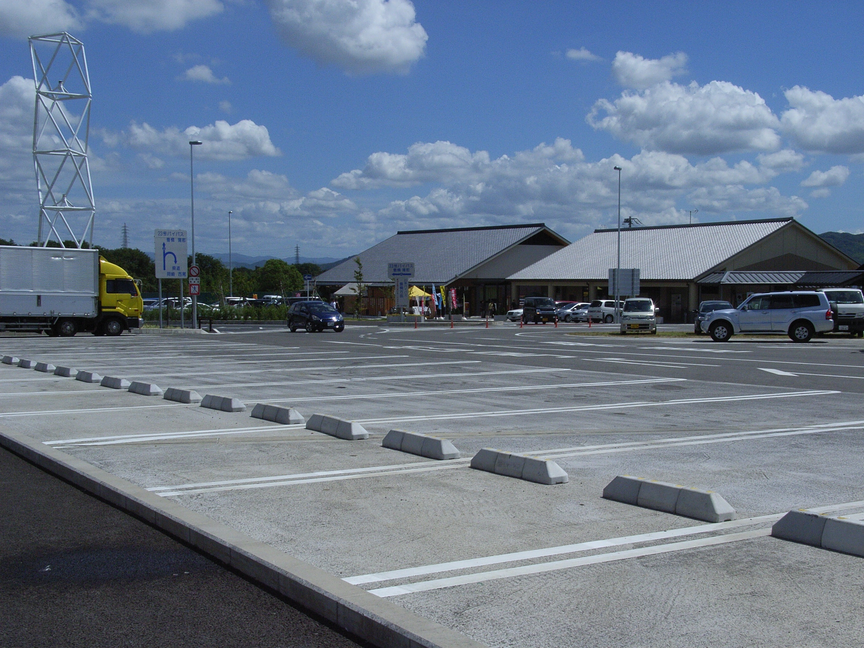 国道23号の道の駅にしお岡ノ山。20100829におはぐろ蜻蛉が撮影。